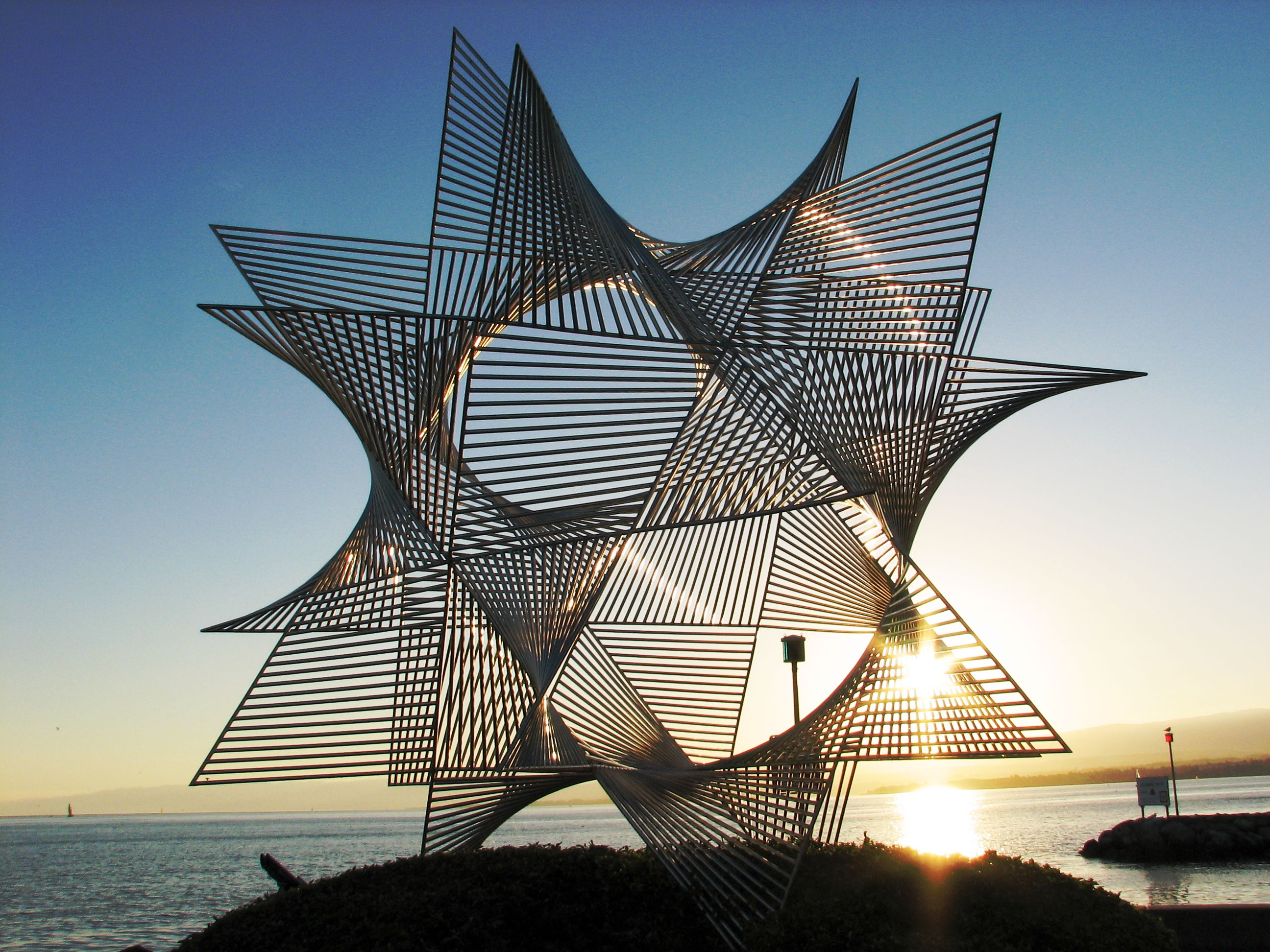 Skulptur am Ufer des Genfer Sees bei Lausanne-Ouchy